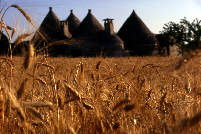 Trulli presso Martina Franca